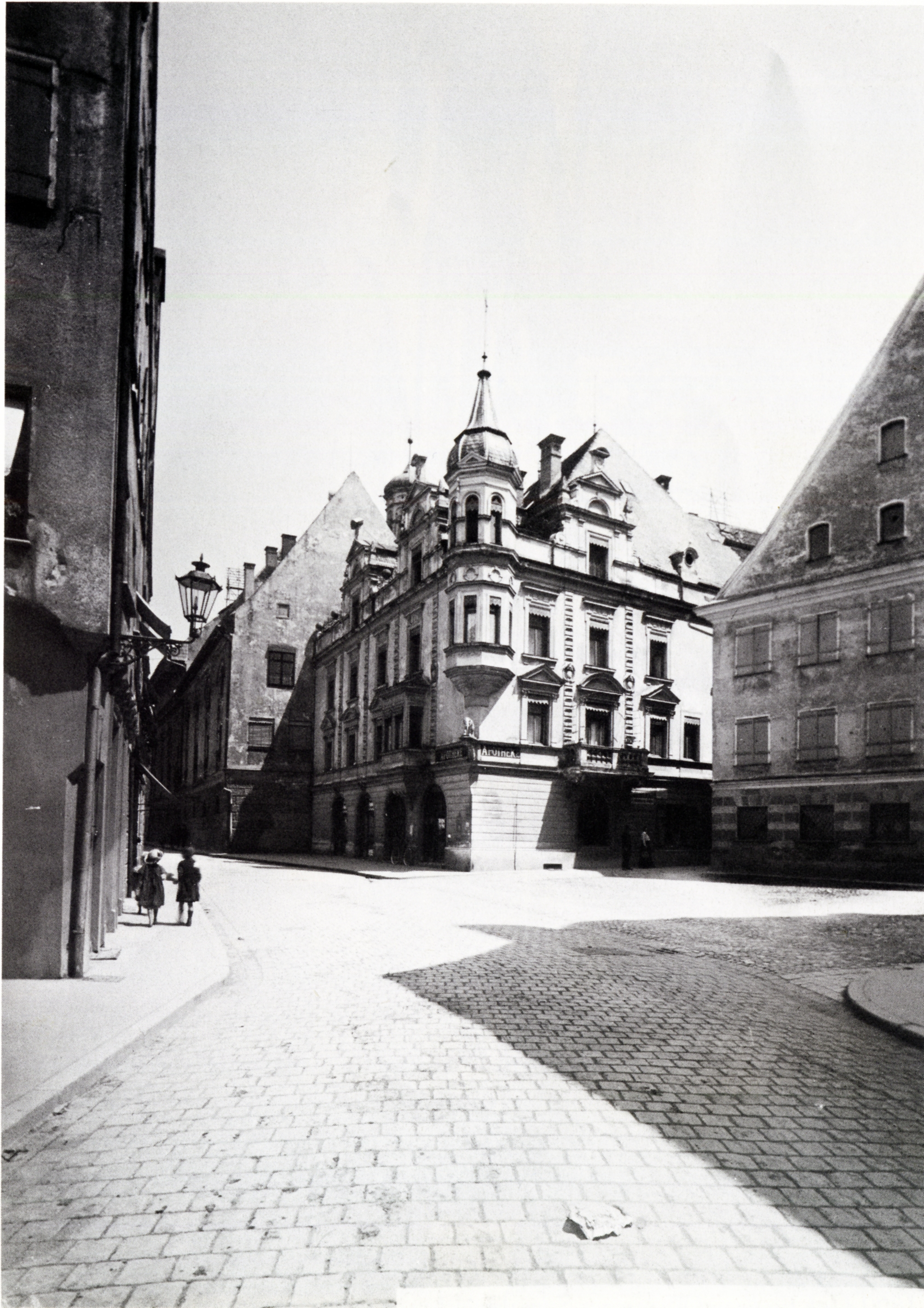 Elefantenapotheke im oberschwäbischen Memmingen. Blick aus der Kalchstraße, Zustand ab 1894 bis etwa 1950